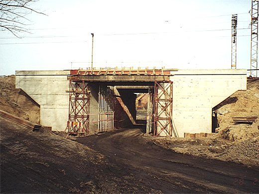 Budowa wiaduktu na Szkolnej w 1999r.